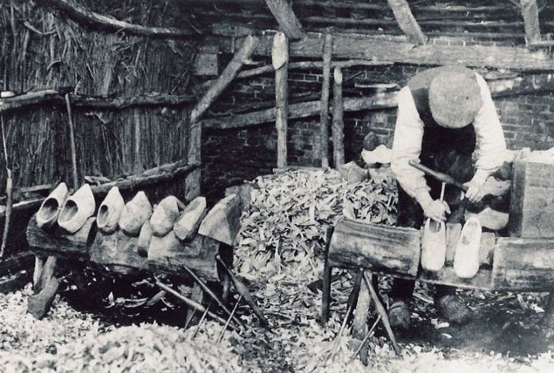 bron[1] klompenmaker, wegens ouderdom (ansicht 1914) PD